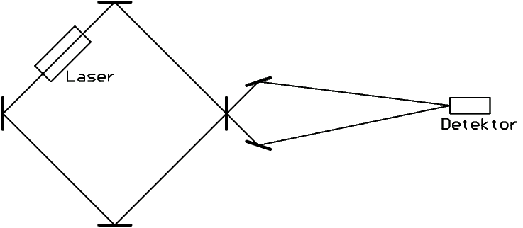 Prinzip eines Laserkreisels